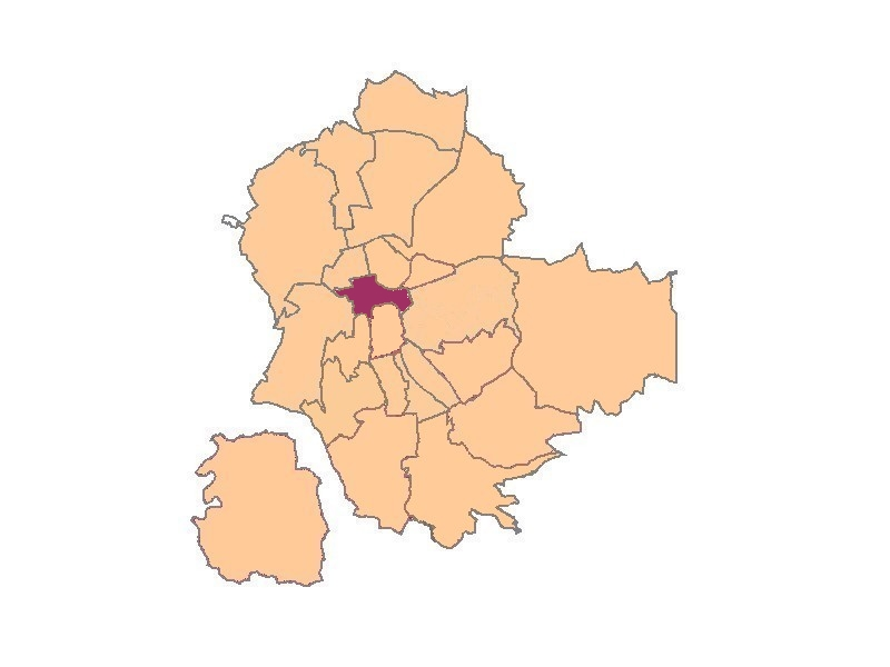 plan de saint-etienne quartier de l'hyper-centre